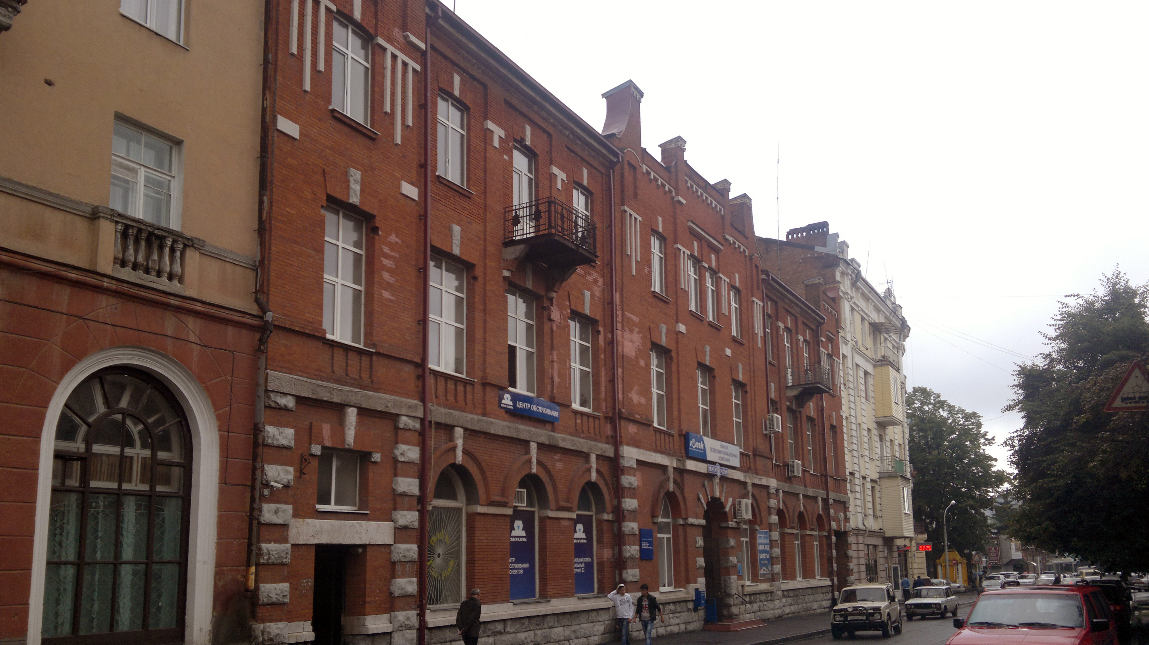 Улица Горького во Владикавказе